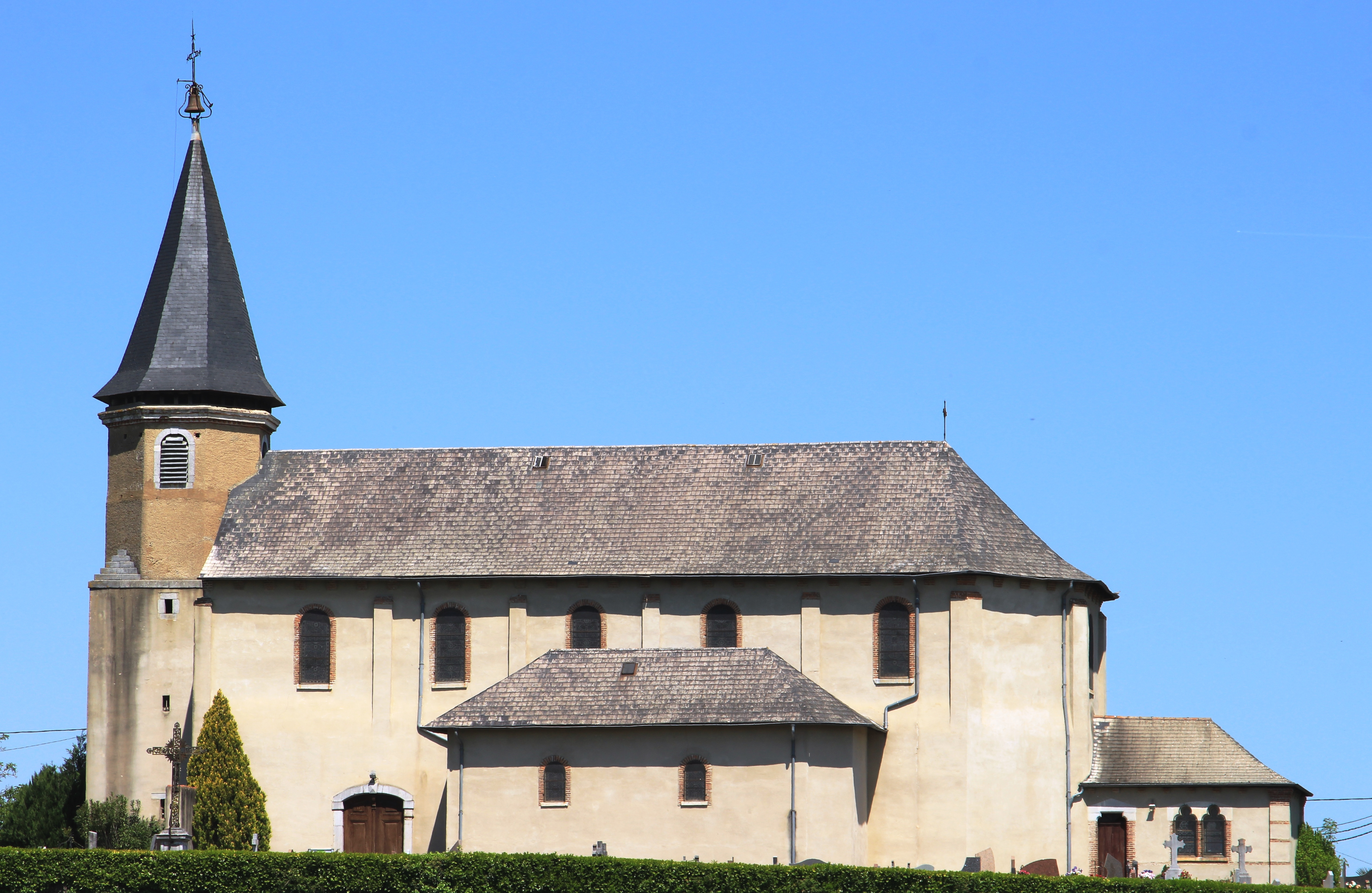 Église Saint-Christophe de Pouyastruc (Hautes-Pyrénées)